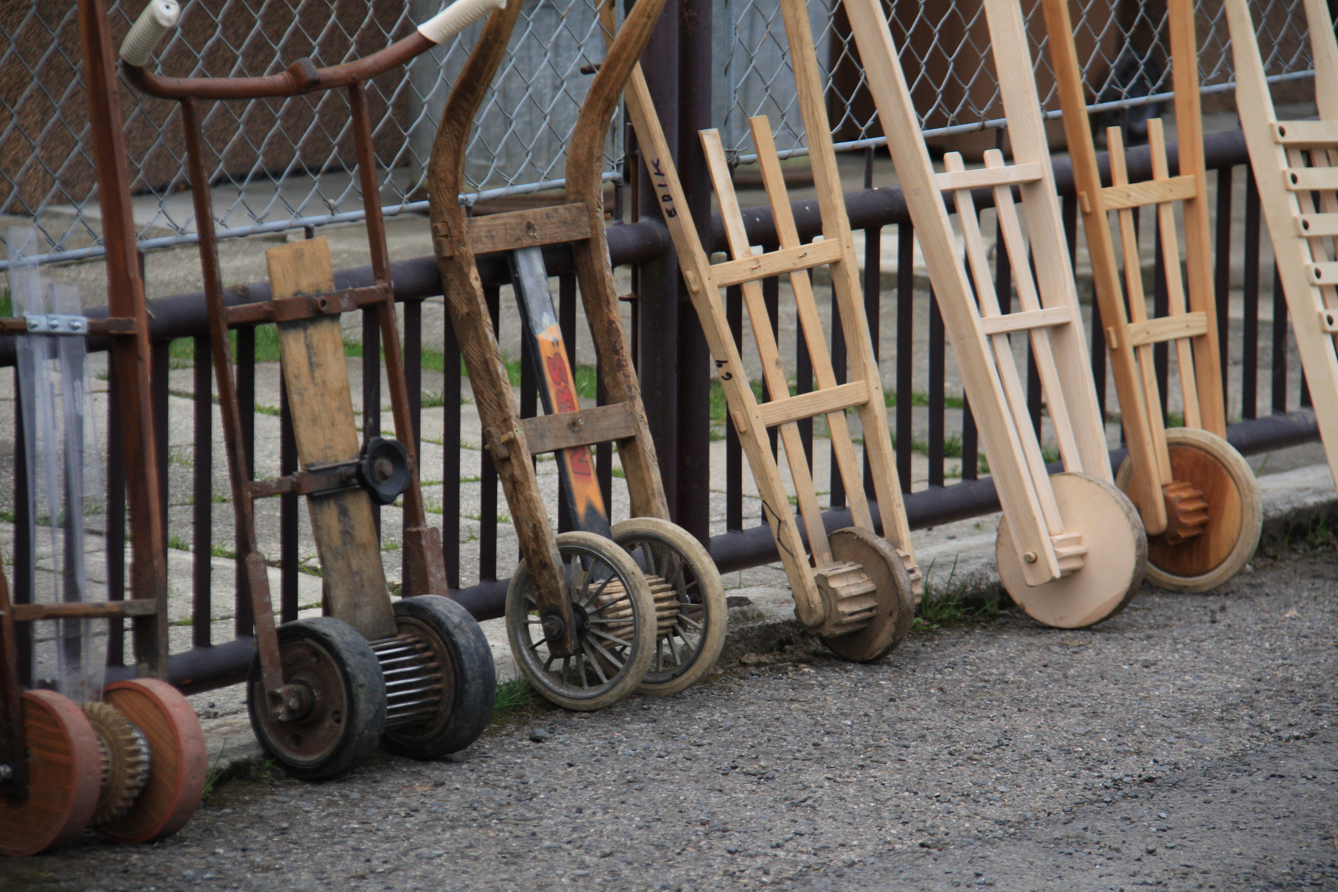 Terkotki taczkowe. Klepotarze (klapotáři) obchodzą domy ze swoimi klapotkami (rapači).